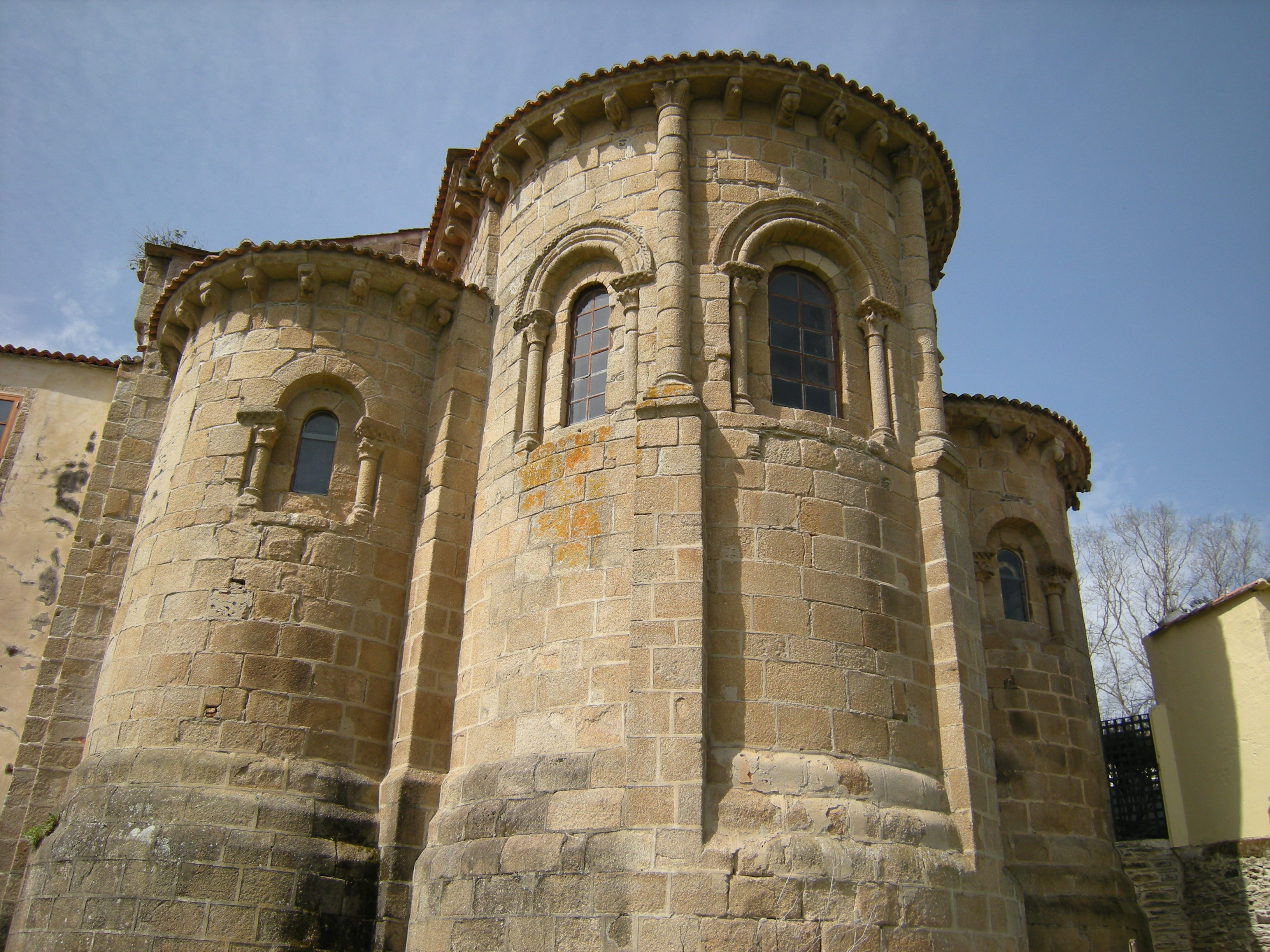 Cabecera de la iglesia.